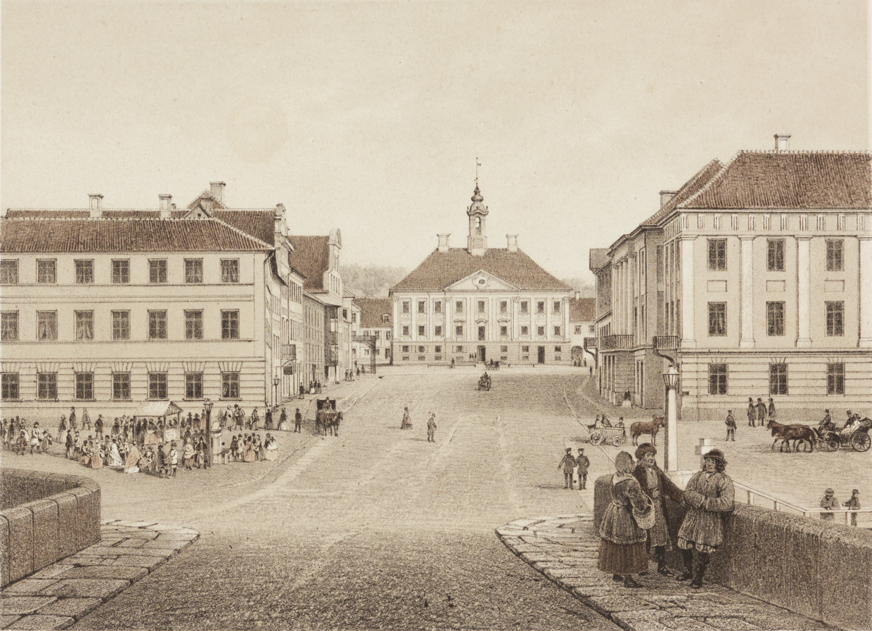 Tartu album. Turu tänav koos raekojaga. This image on crowdsourcing geotagging platform Ajapaik MUIS:TKM TR 4038 H 31:11